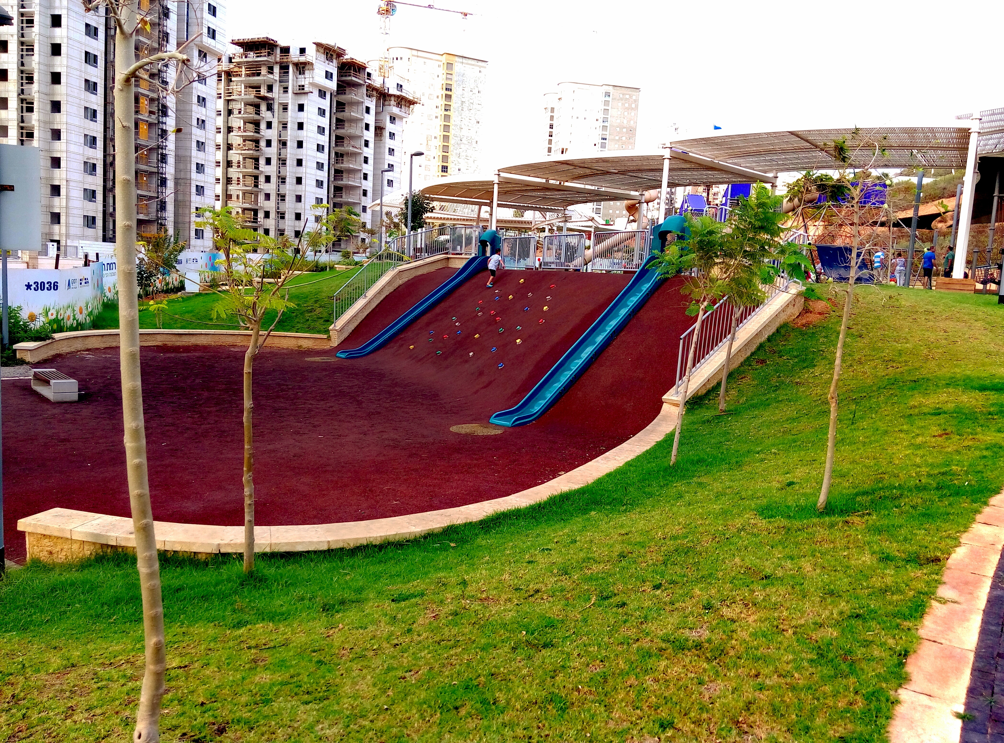 קיר הטיפוס בפארק הפרפר רמת הנשיא בחיפה